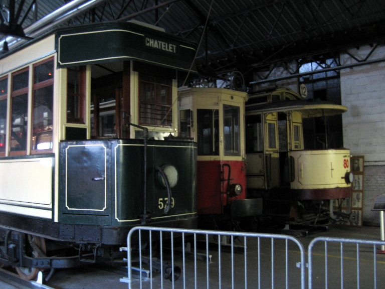 Tramways historiques (Paris STCRP à gauche, Lyon, Genève) à AMTUIR 15/09/2007.